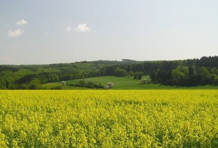 Grauer Kopf aus Richtung Südwesten